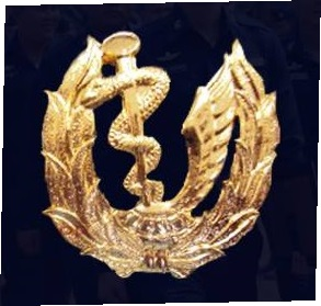 ทอ.